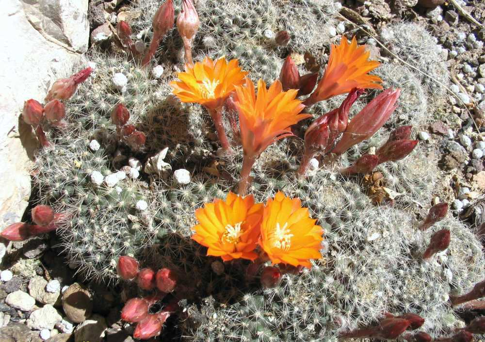 Rebutia fiebrigii (Rebutia flavistyla), in free culture in Jardin Botanique de Monaco.